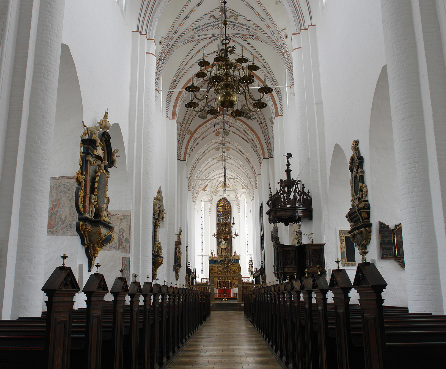 Dom zu Århus: Mittelschiff